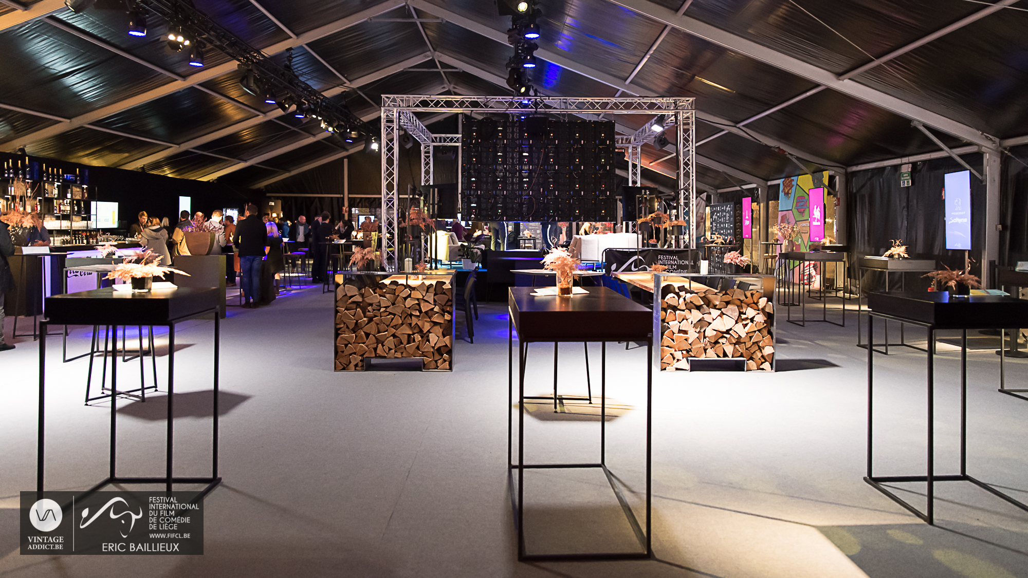 photo du chapiteau